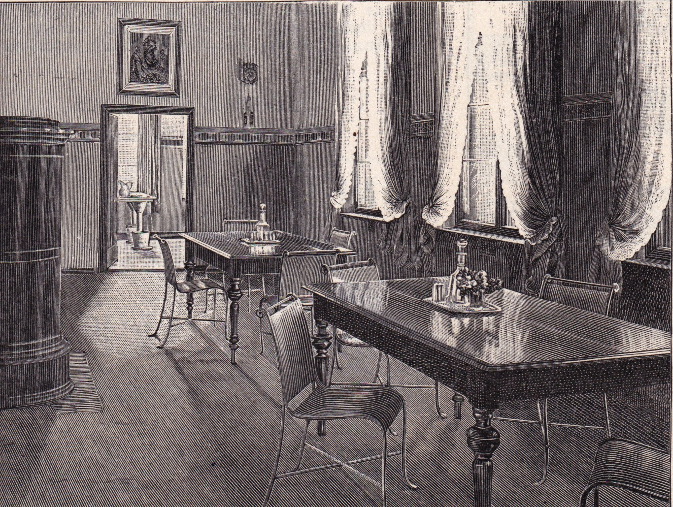 Einer von zwei Tagesräumen im Lepraheim Memel